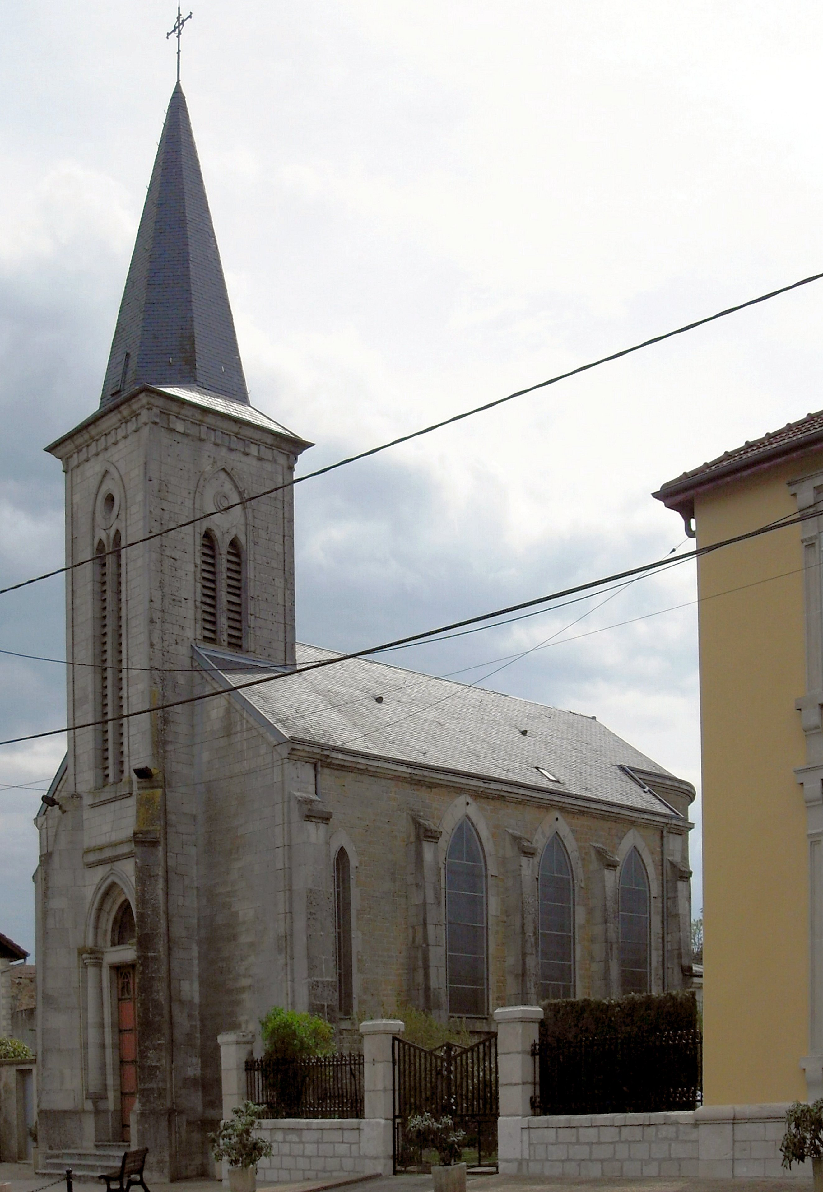 L'église Notre-Dame-de-Bon-Secours à Noërs, commune de Longuyon